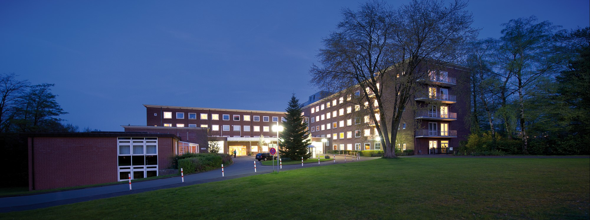 Seitenansicht des St. Vincenz-Krankenhaus Paderborn